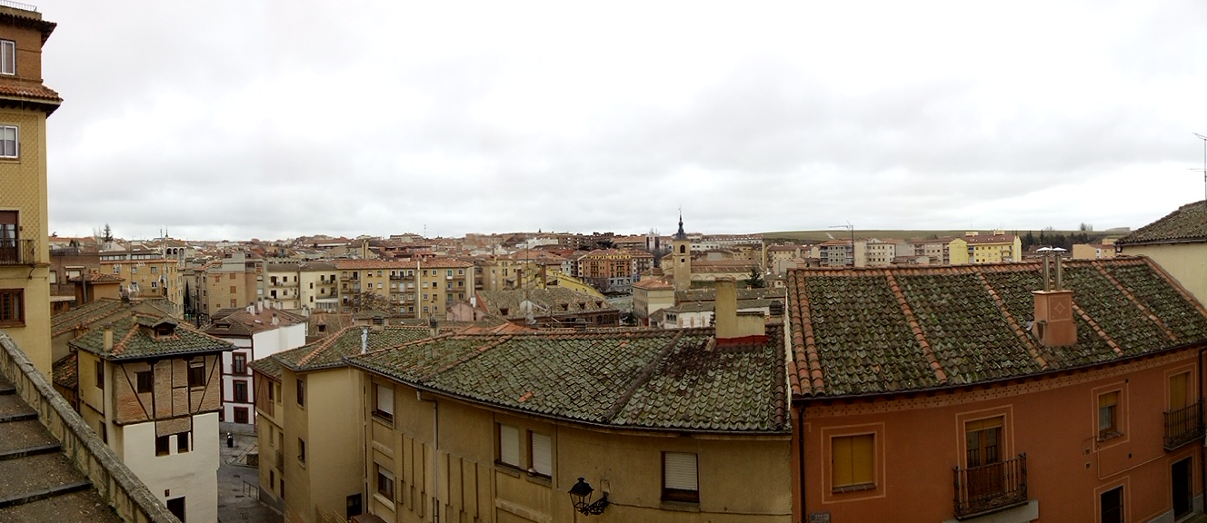 Mirador de la canaleja, Segovia.